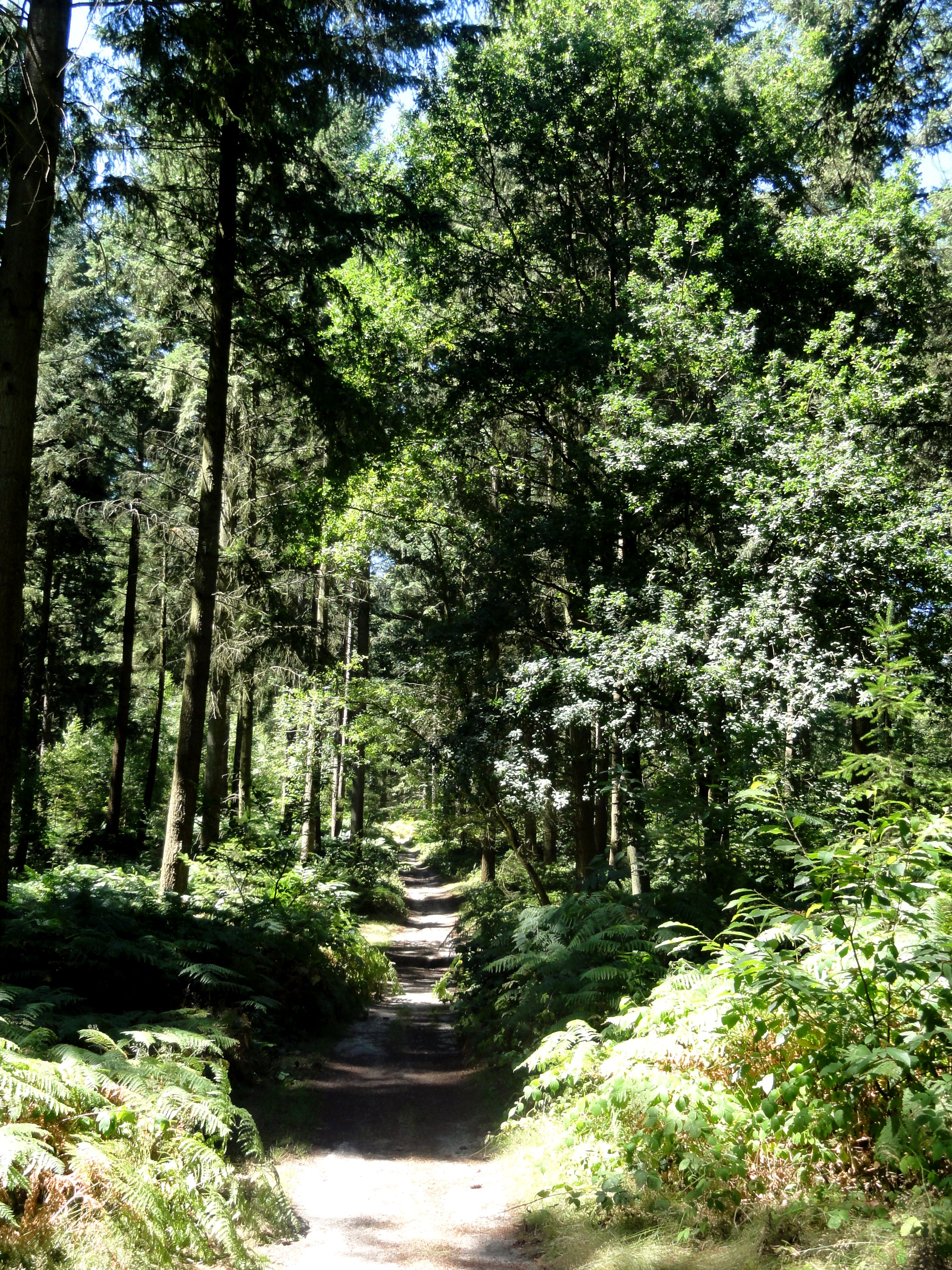 Laie de la Croix Blanche, entre Vauciennes et Vaumoise.